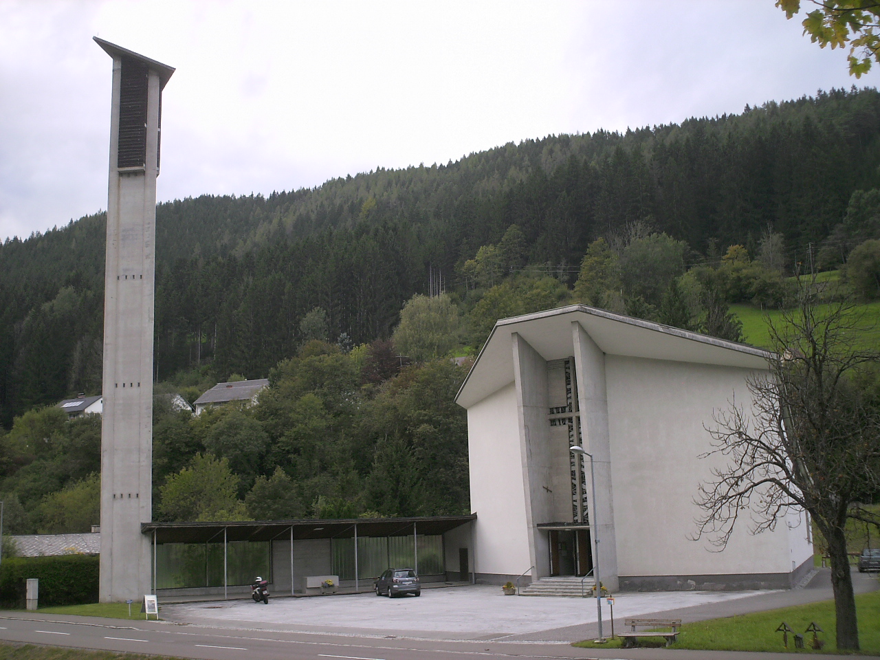 Kath. Pfarrkirche hl. Dreifaltigkeit in Thörl/Österreich.